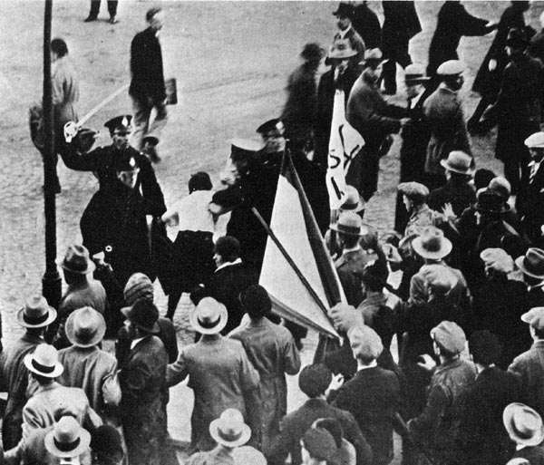 Ådalshändelserna. Demonstration med sammanstötningar i Stockholm